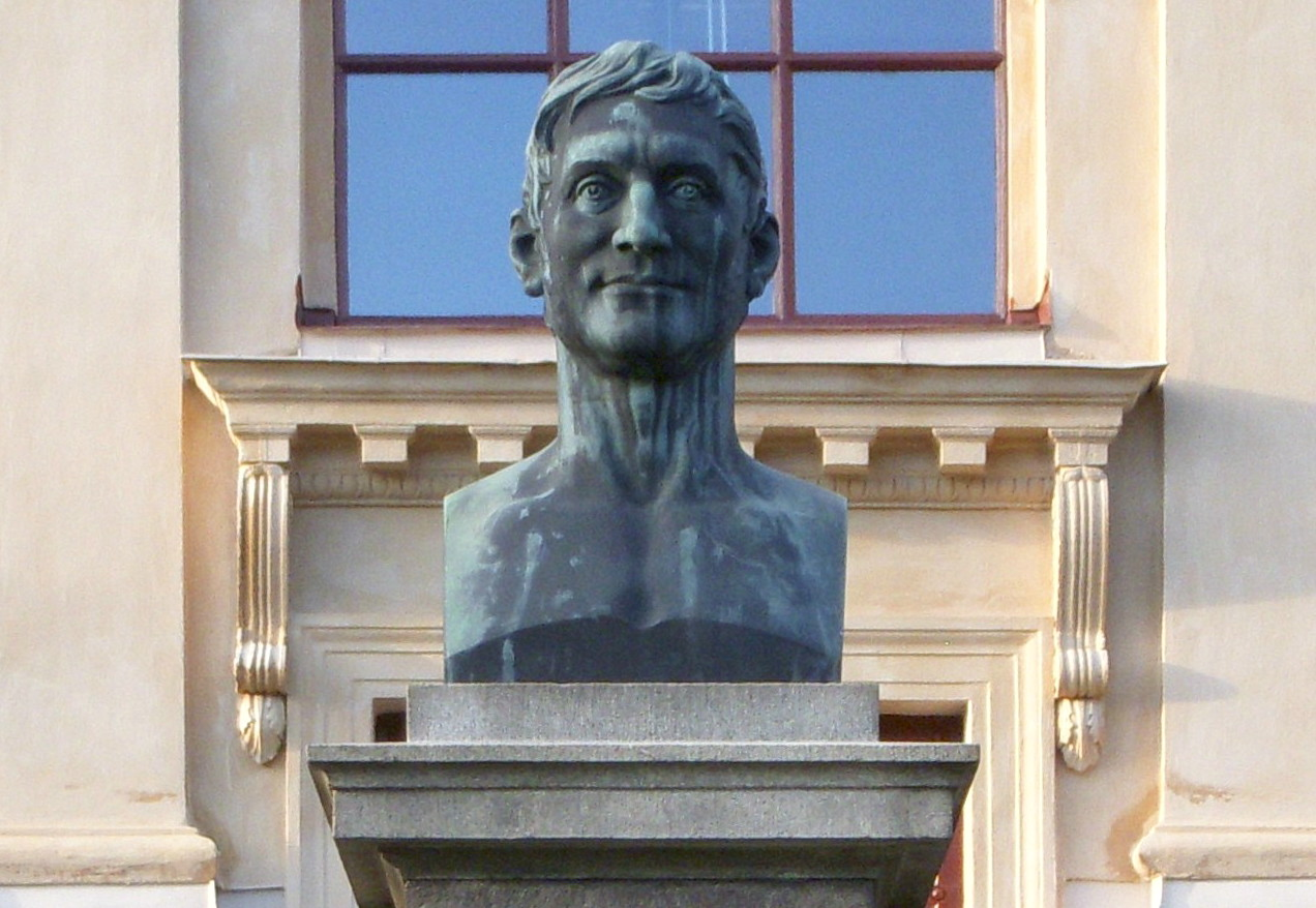 Gymnastikhuset vid Manillaskolan med byst av Frithiof Kjellberg visande Pär Aron Borg, gjutning av Otto Meyers konstgjuteri